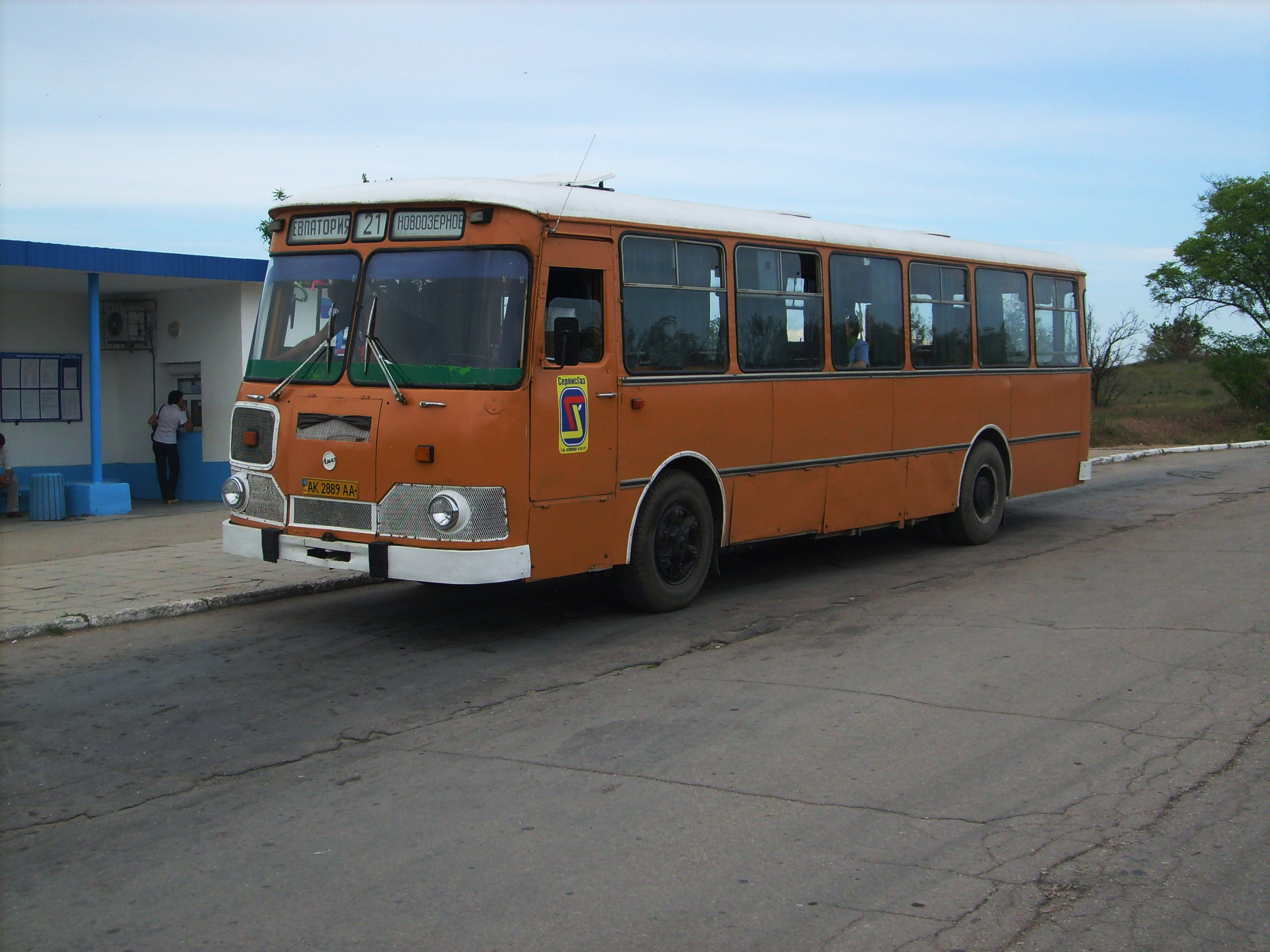 ЛиАЗ в Новоозёрном